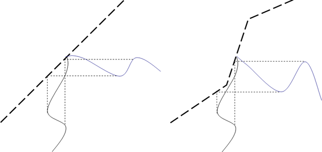 linear vs nichtlineare input-output-beziehung